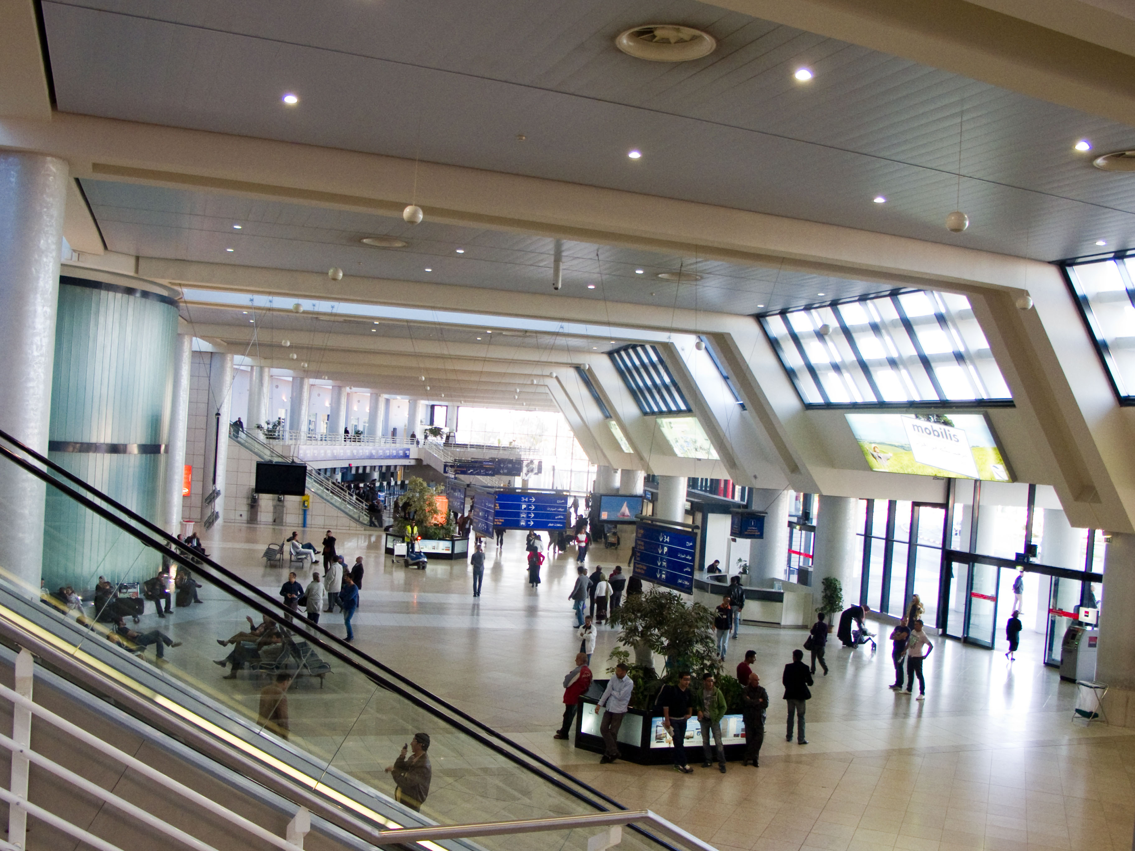 Aéroport Houari Boumediene, Dar El Beida, Alger, Algérie (nouvel aérogare, hall de départ)